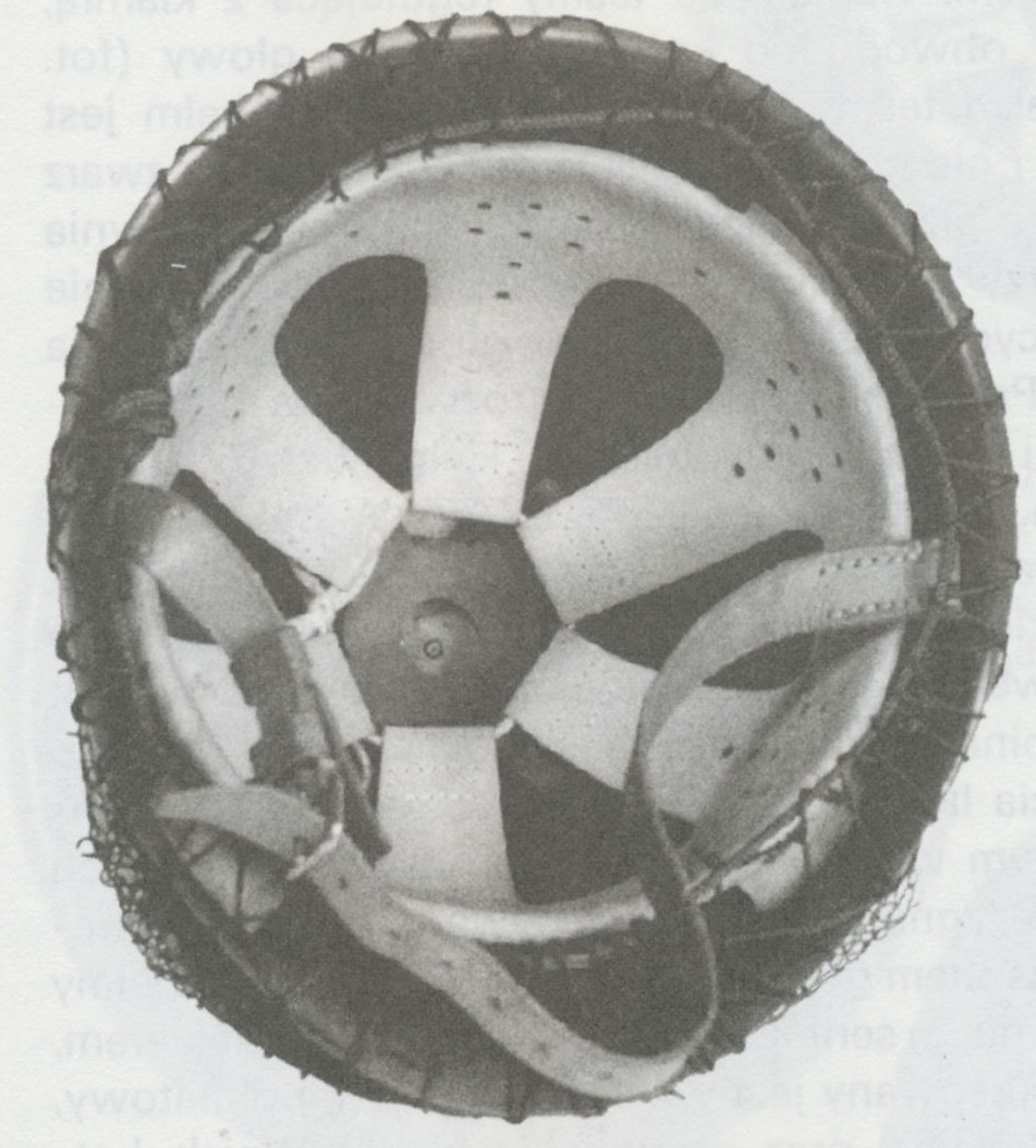 Hełm wz. 67- fasunek